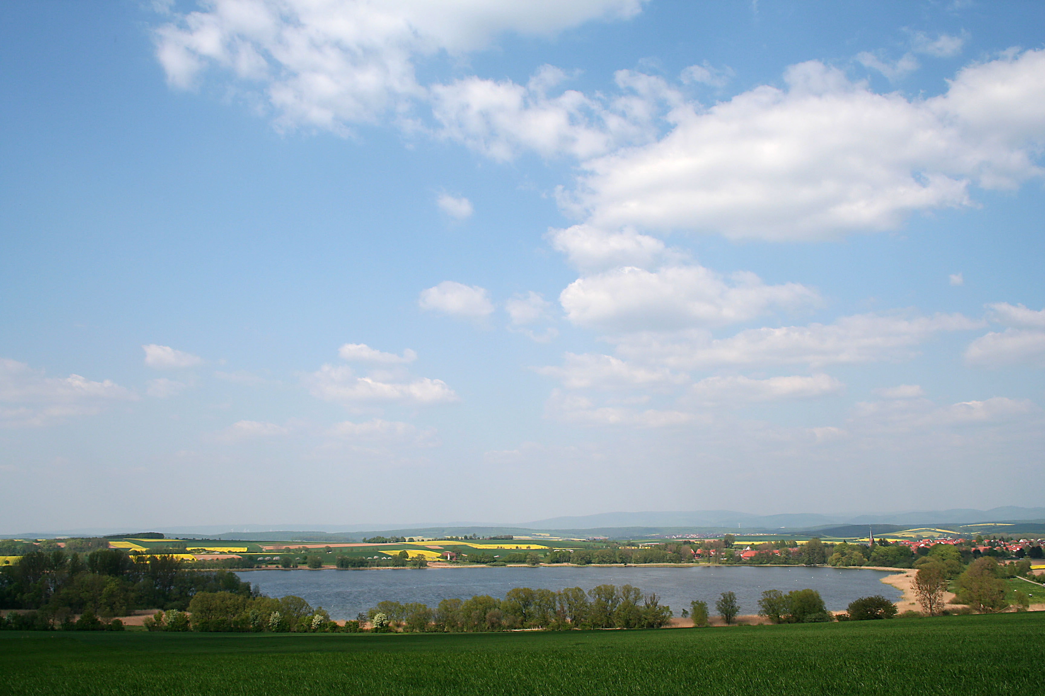 Seeburger See